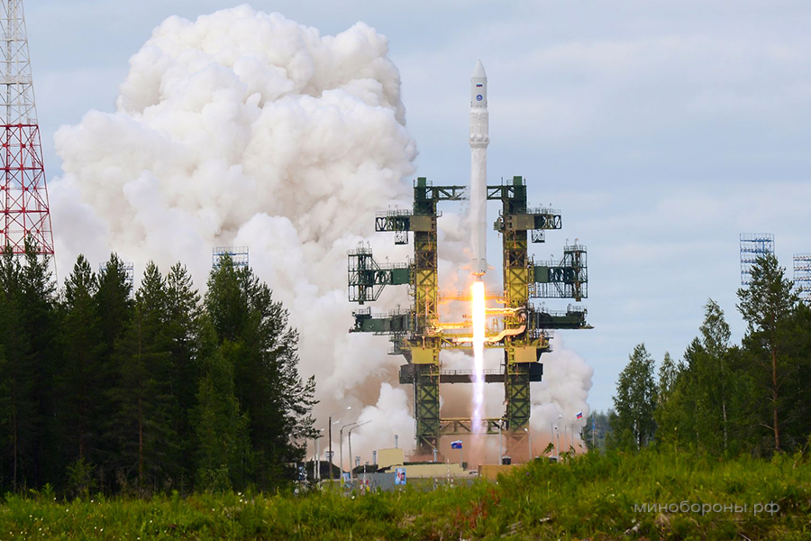 Первый испытательный пуск ракеты-носителя «Ангара-1.2ПП» (ГИК Плесецк, Архангельская обл.)